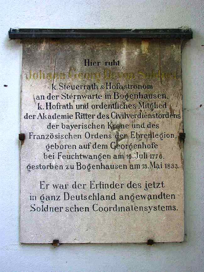 Tafel an der Kirche St. Georg in Bogenhausen (Ehrengrab). An der westlichen Außenwand die Gedenktafel über seiner Grabstätte, angebracht vom königlichen Katasterbüro im Jahr 1892 für Johann Georg von Soldner